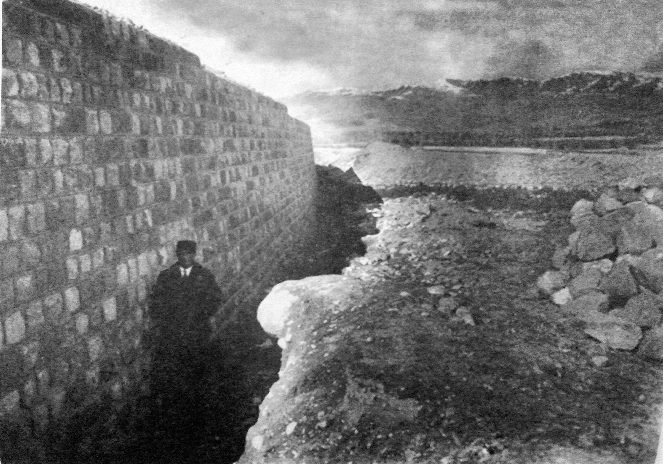 حاج حسینقلی خان جلیلی (ارفع الملک)، شهردار تبریز در کنار دیوار سد در جلو دروازه تهران، ۱۳۱۳/۹/۱۵